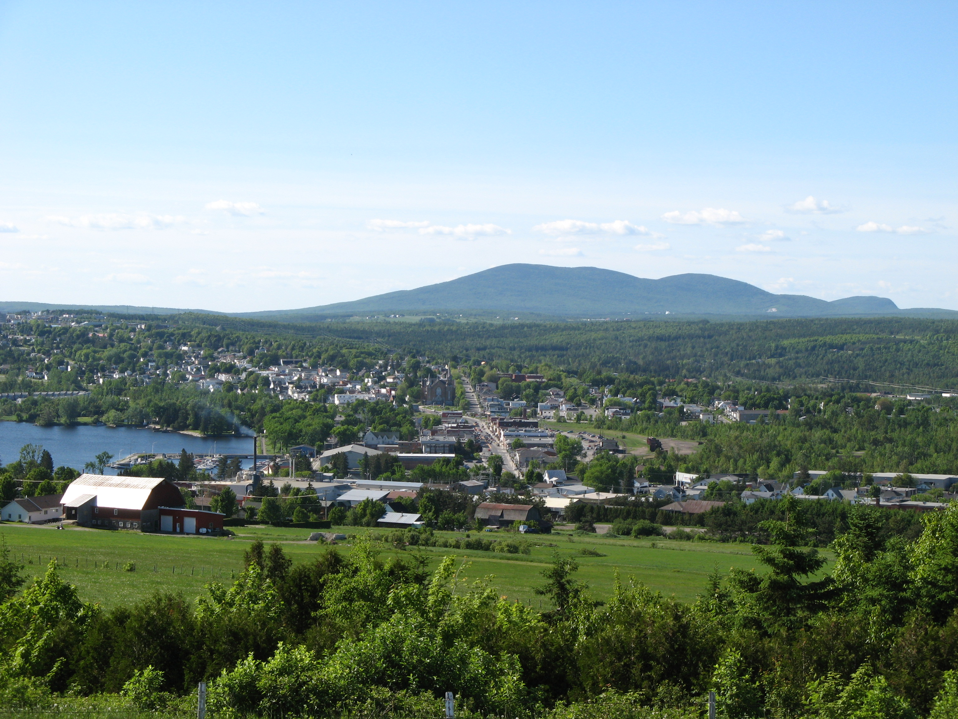 La ville de Lac-Mégantic vu du parc de la croix lumineuse. On y voit une petite partie du lac Mégantic et le Mont Ste-Cécile à l'arrière.